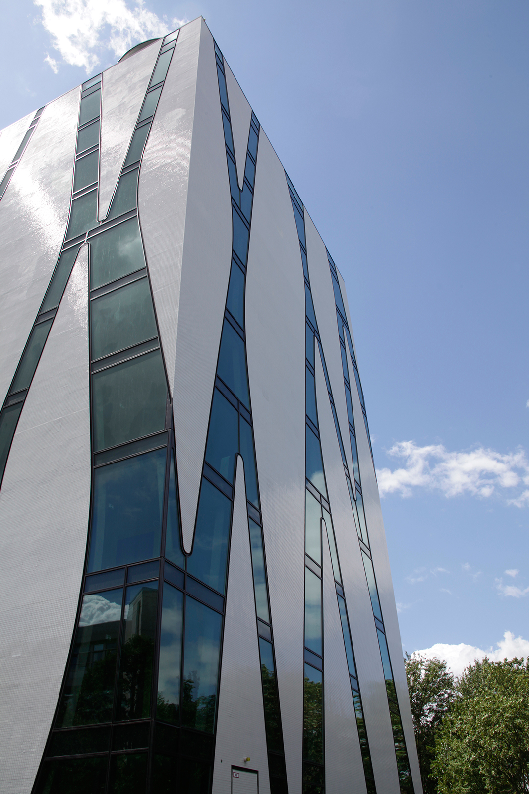 OASE der Medizinischen Fakultät der Heinrich-Heine-Universität Düsseldorf